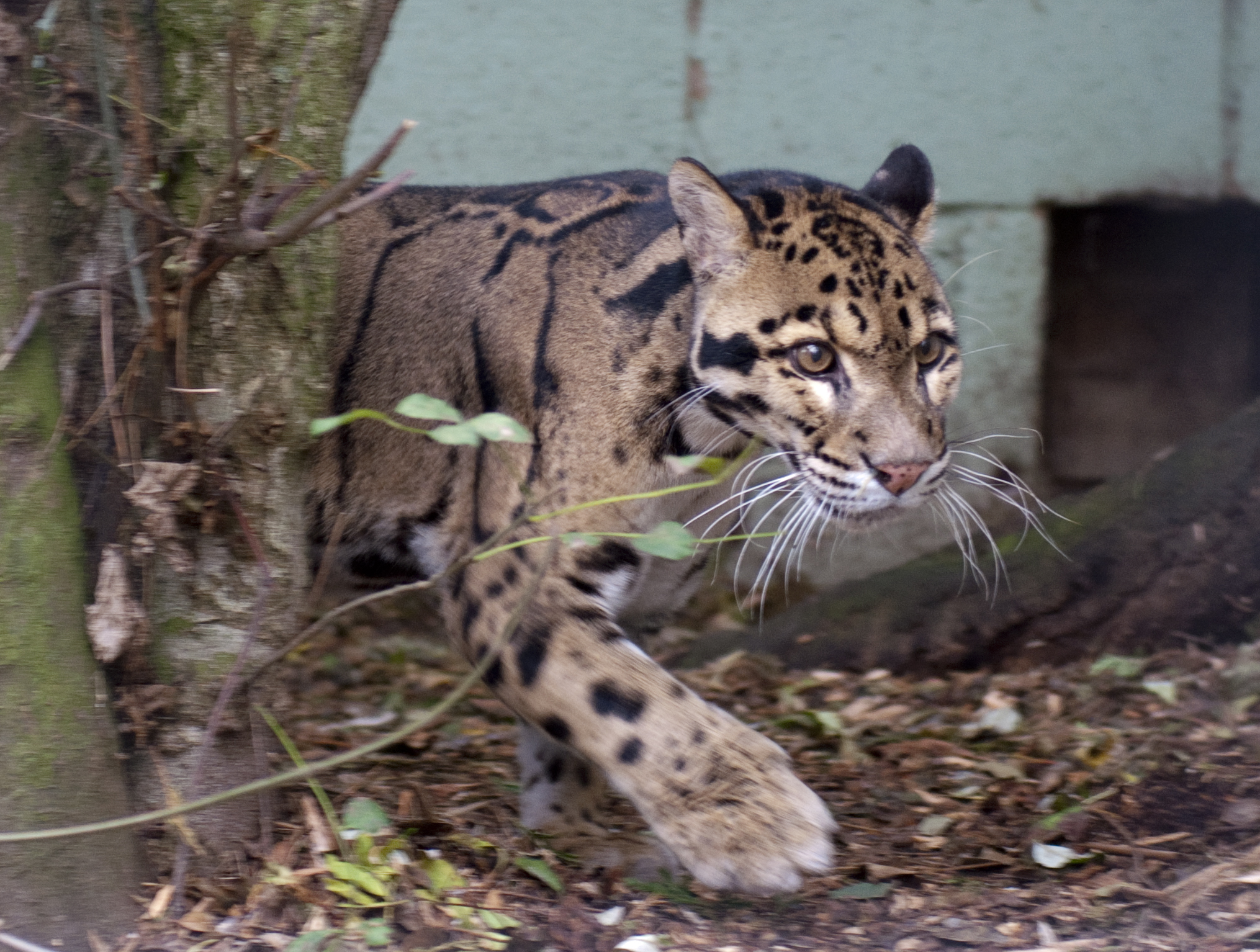 Une Panthère nébuleuse (Neofelis nebulosa) au Cat Survival Trust.